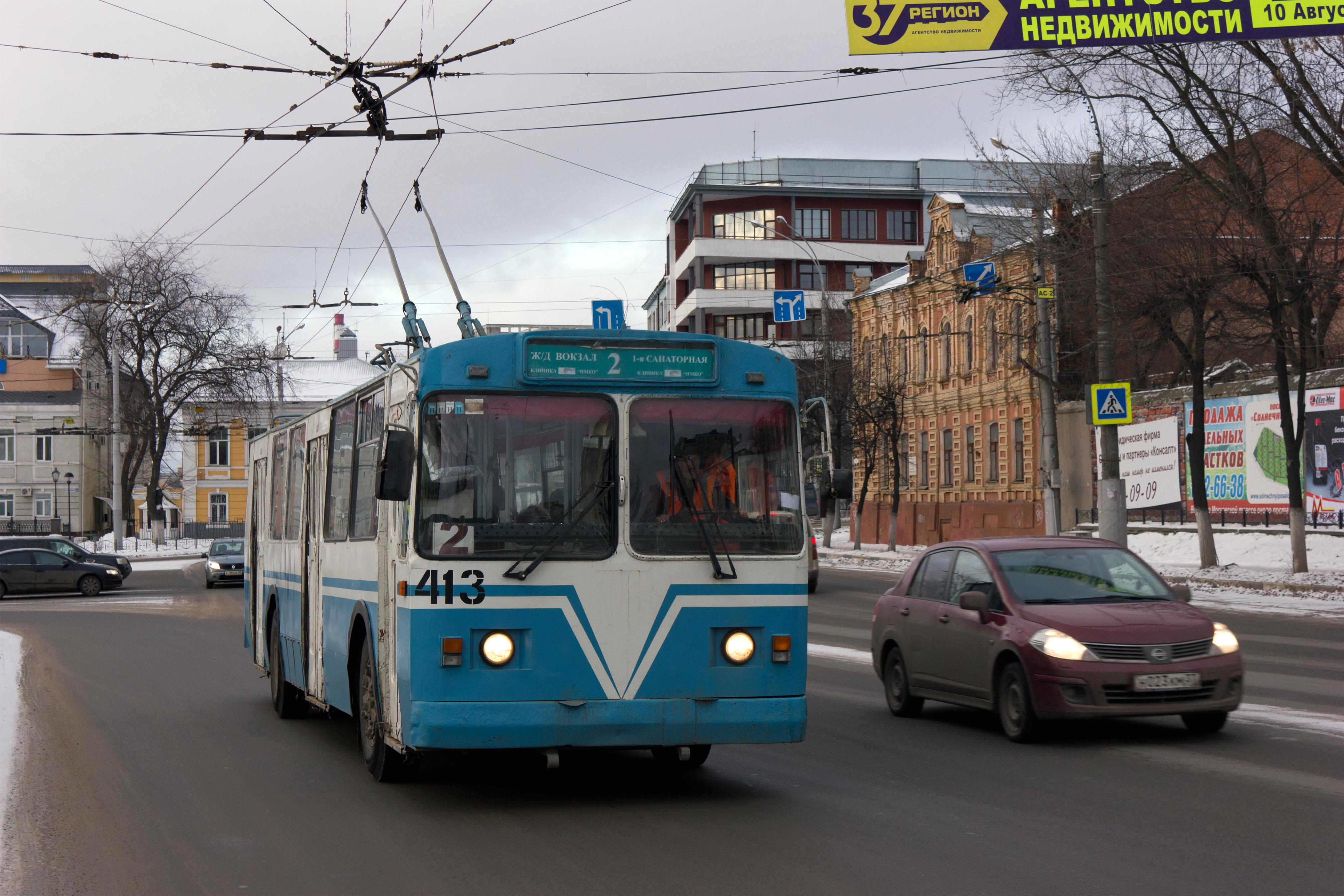 Иваново. Троллейбус маршрута №2 на площади Революции